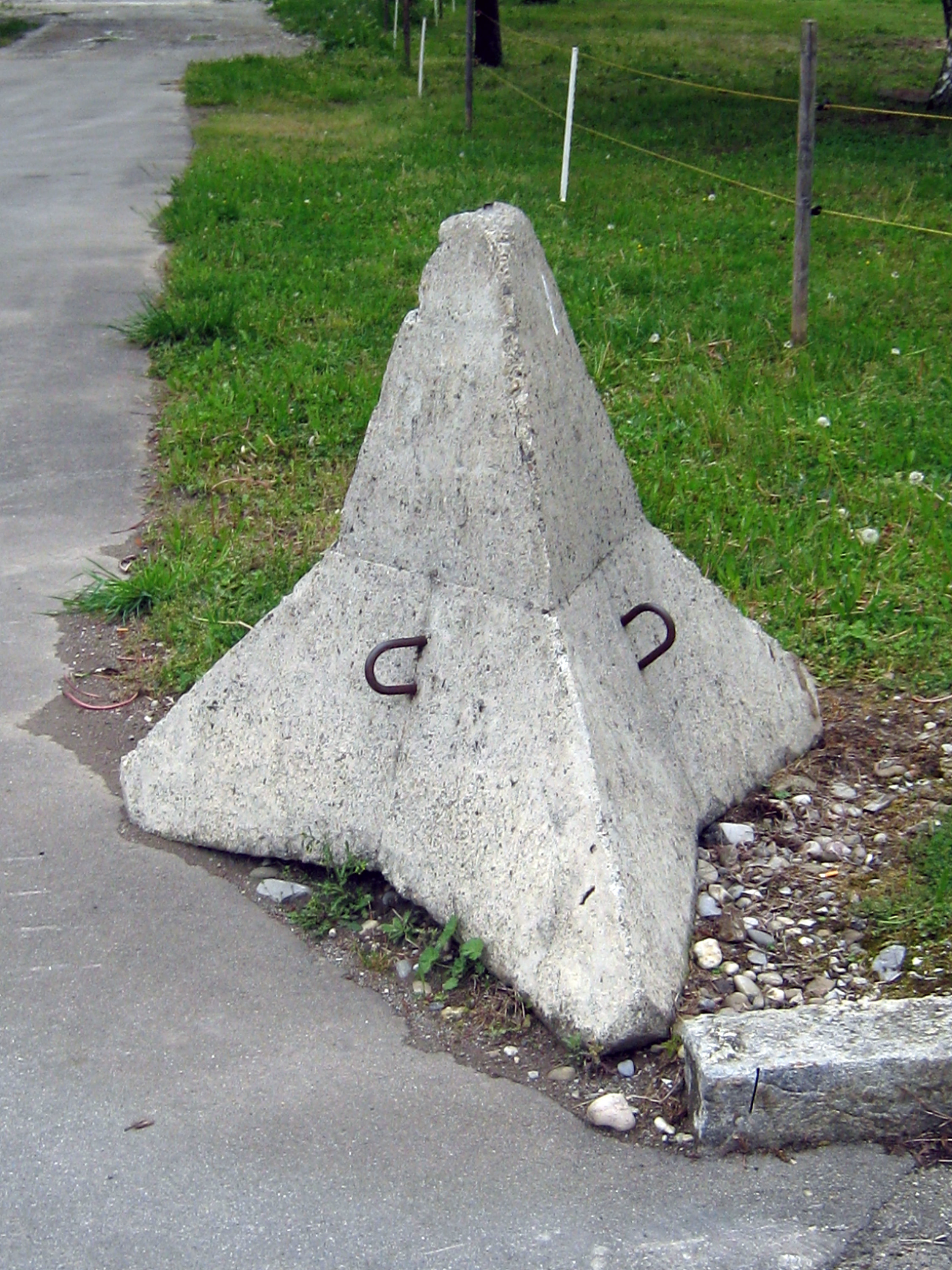 Panzerhindernis beim Militärmuseum Full